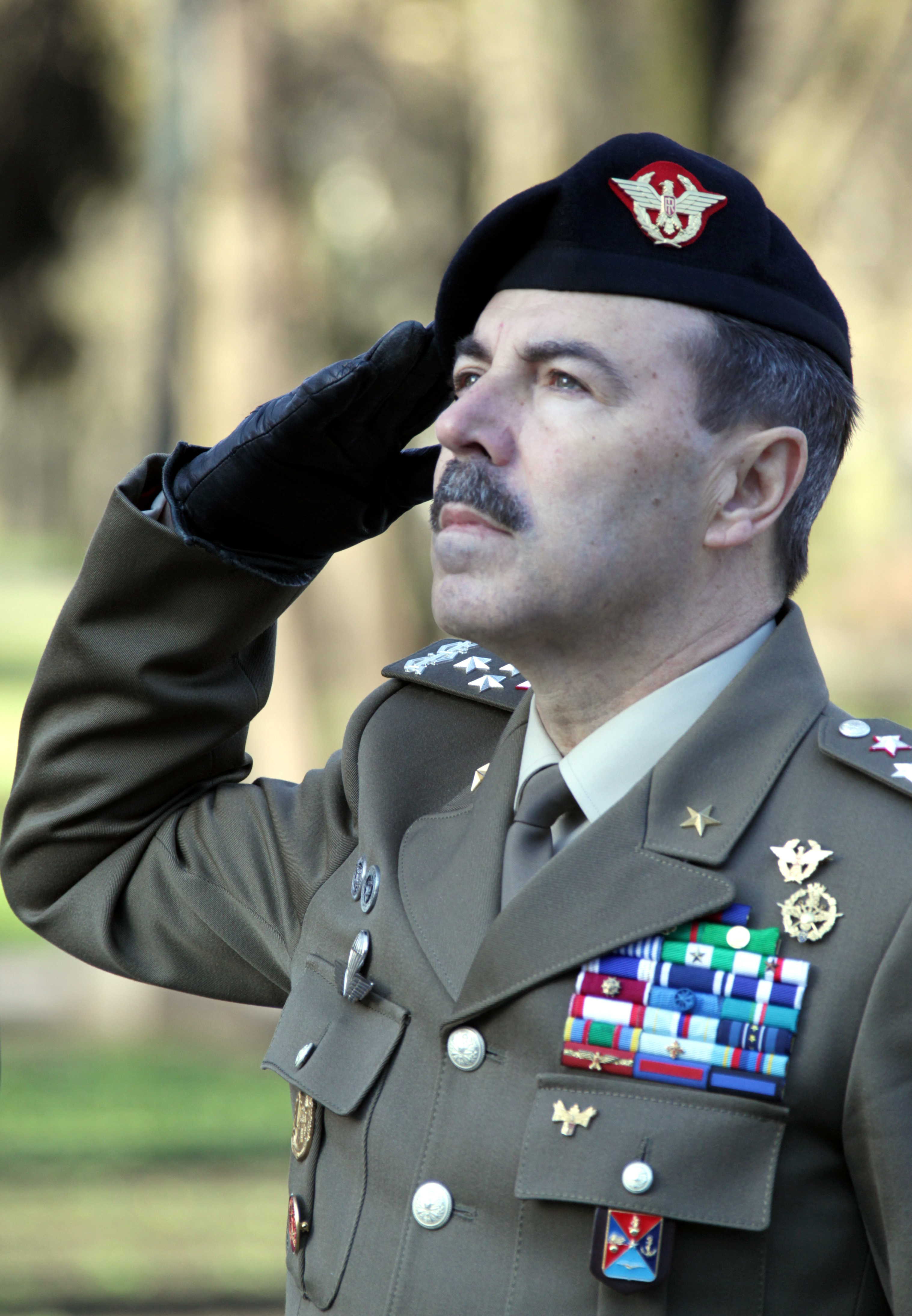 Commander JFC Brunssum visits Latvia